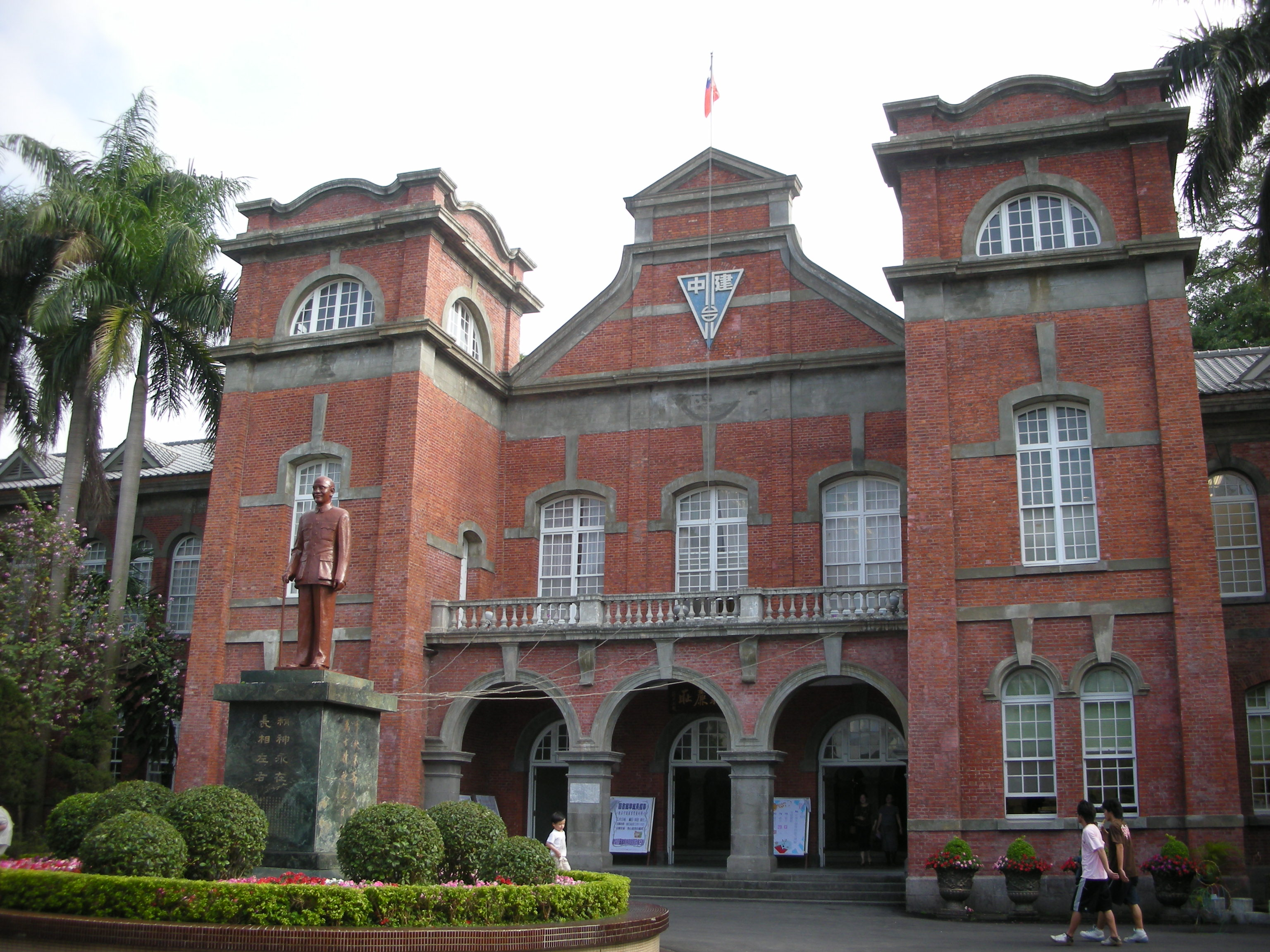 臺北市建中紅樓正立面。